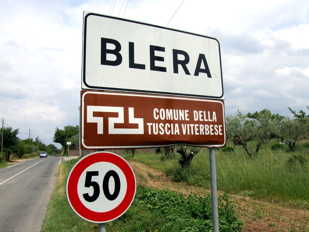 Segnale di Blera, Lazio, Italia